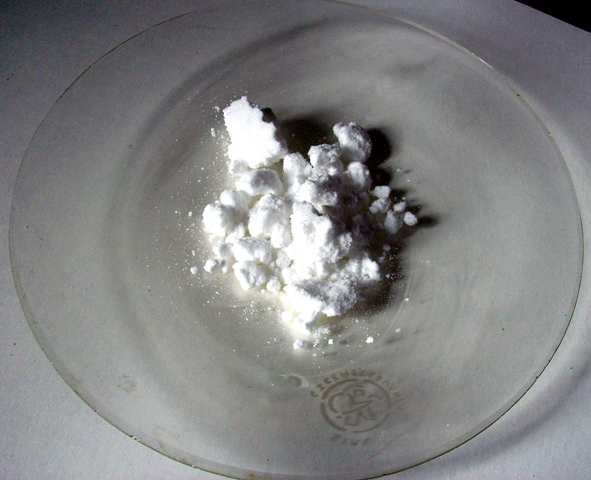 K2S2O8